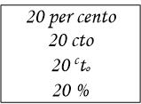 A százalékjel történeti kialakulása